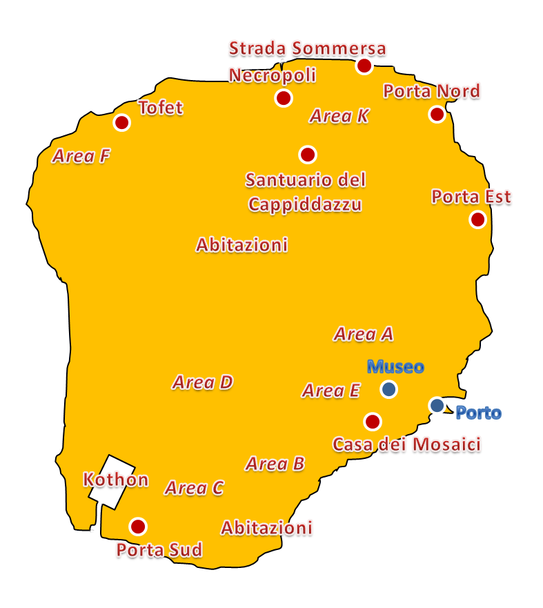 User:Archeologo/Template:Archeologo